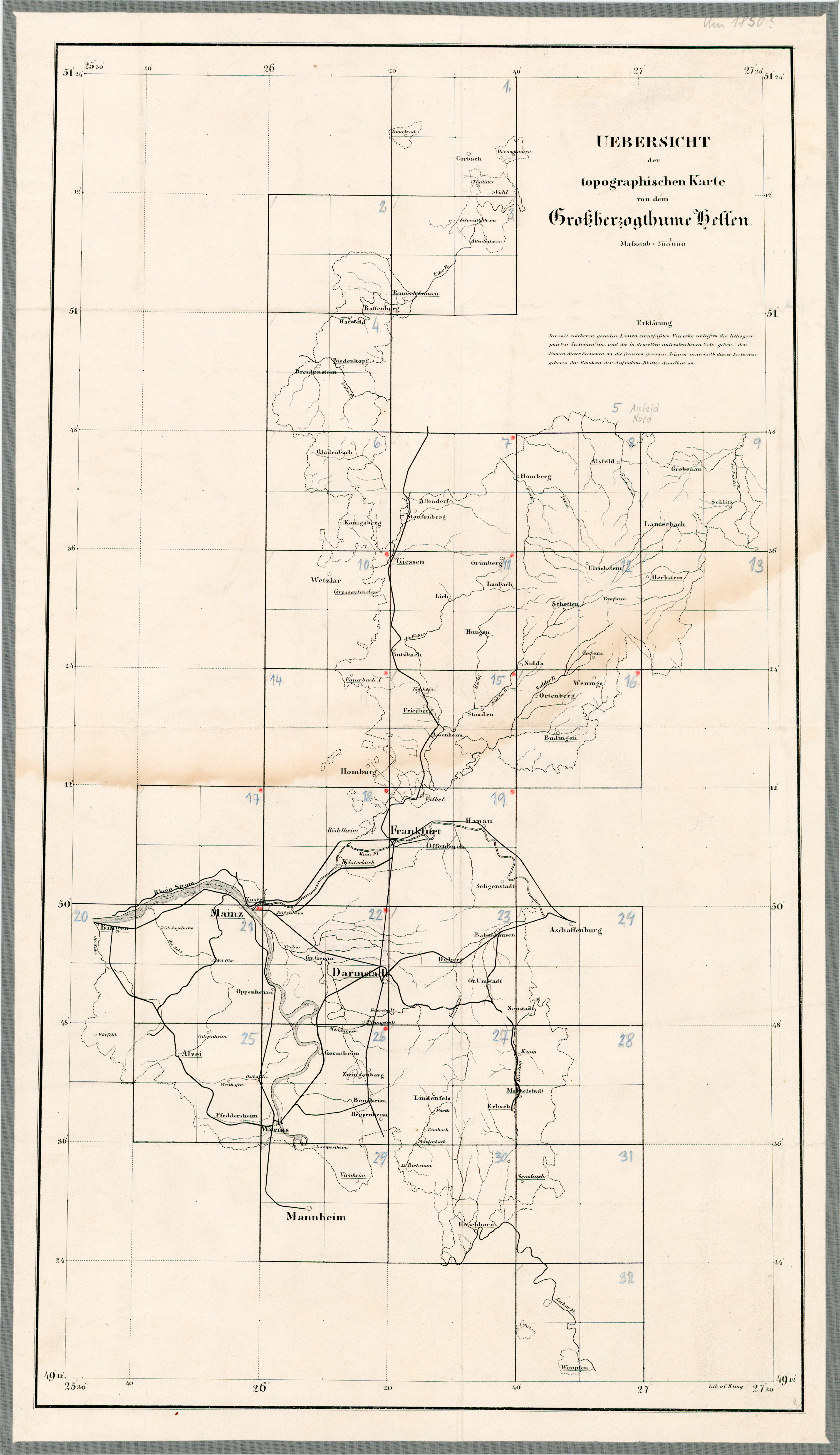 Historische Karte des Großherzogtums Hessen von 1832 bis 1850. Übersichtskarte